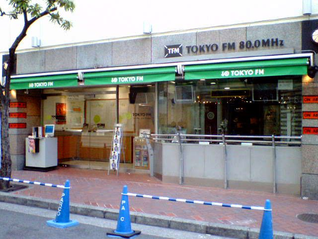 TOKYO FM・スペイン坂スタジオ 撮影日 2005年5月4日 撮影者 本人